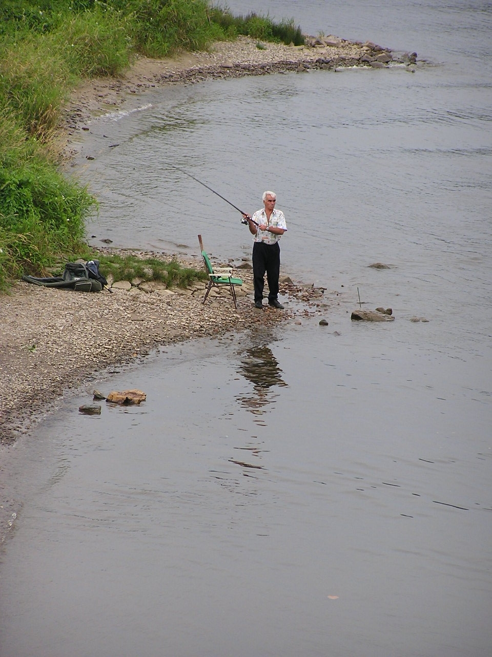 Angler